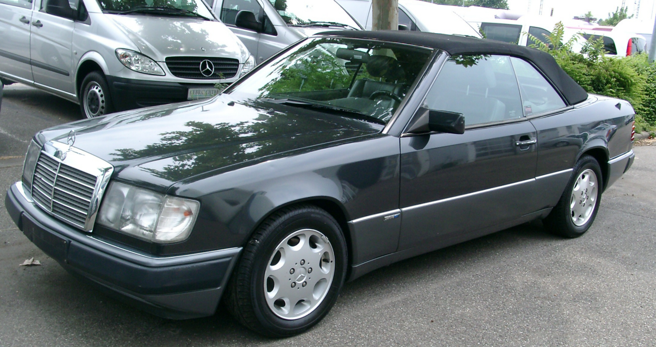 Mercedes W124 Cabriolet (A124)